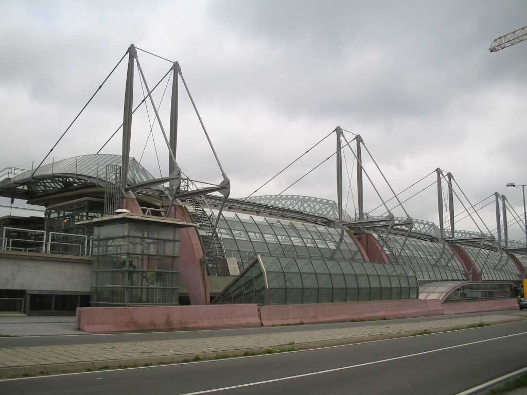 Station Schiedam, 22 oktober 2005